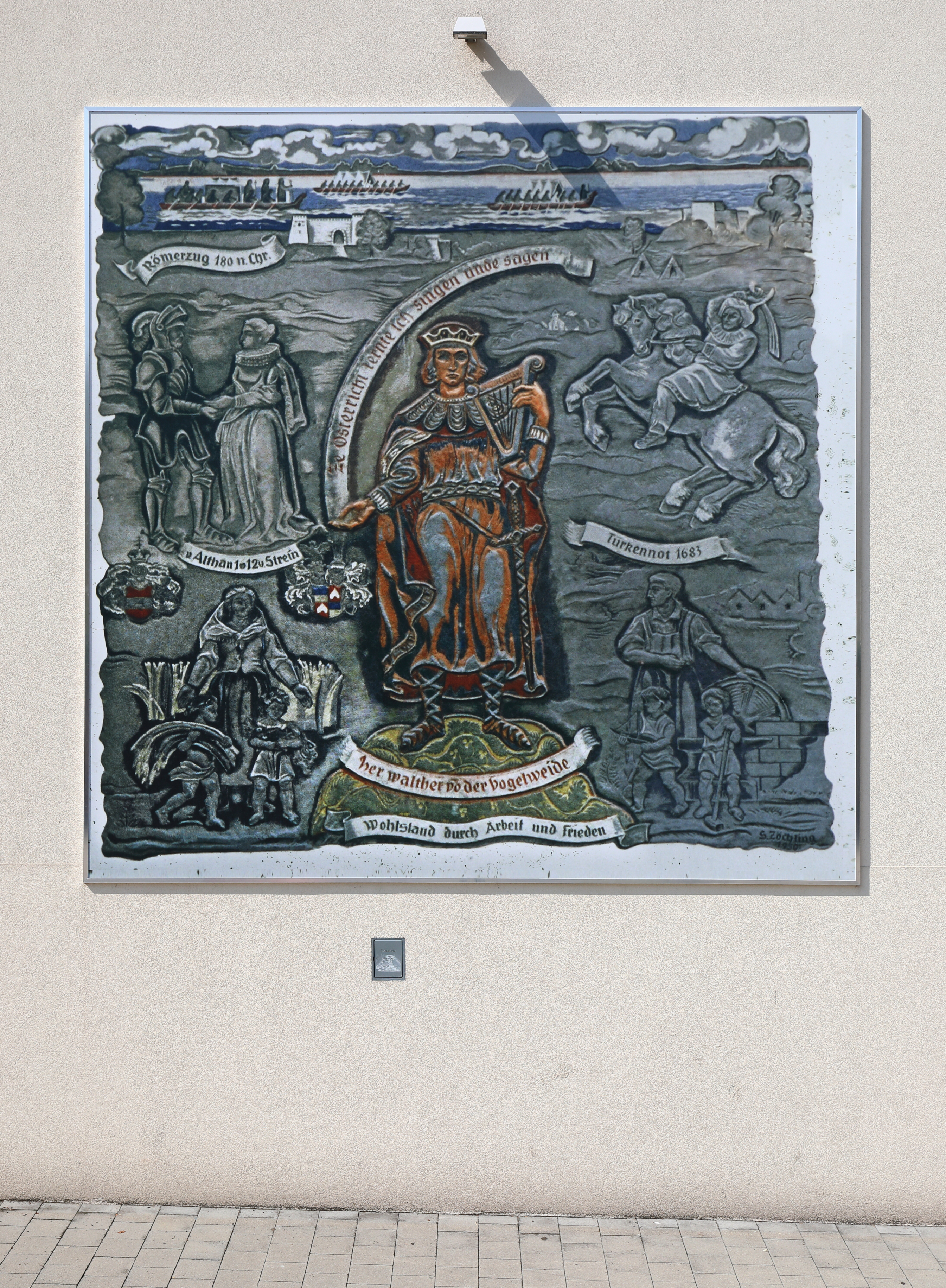 Putzrelief (?) von Sepp (Josef) Zöchling aus dem Jahr 1950 an der Ostwand der Volksschule in der niederösterreichischen Marktgemeinde Zwentendorf an der Donau.